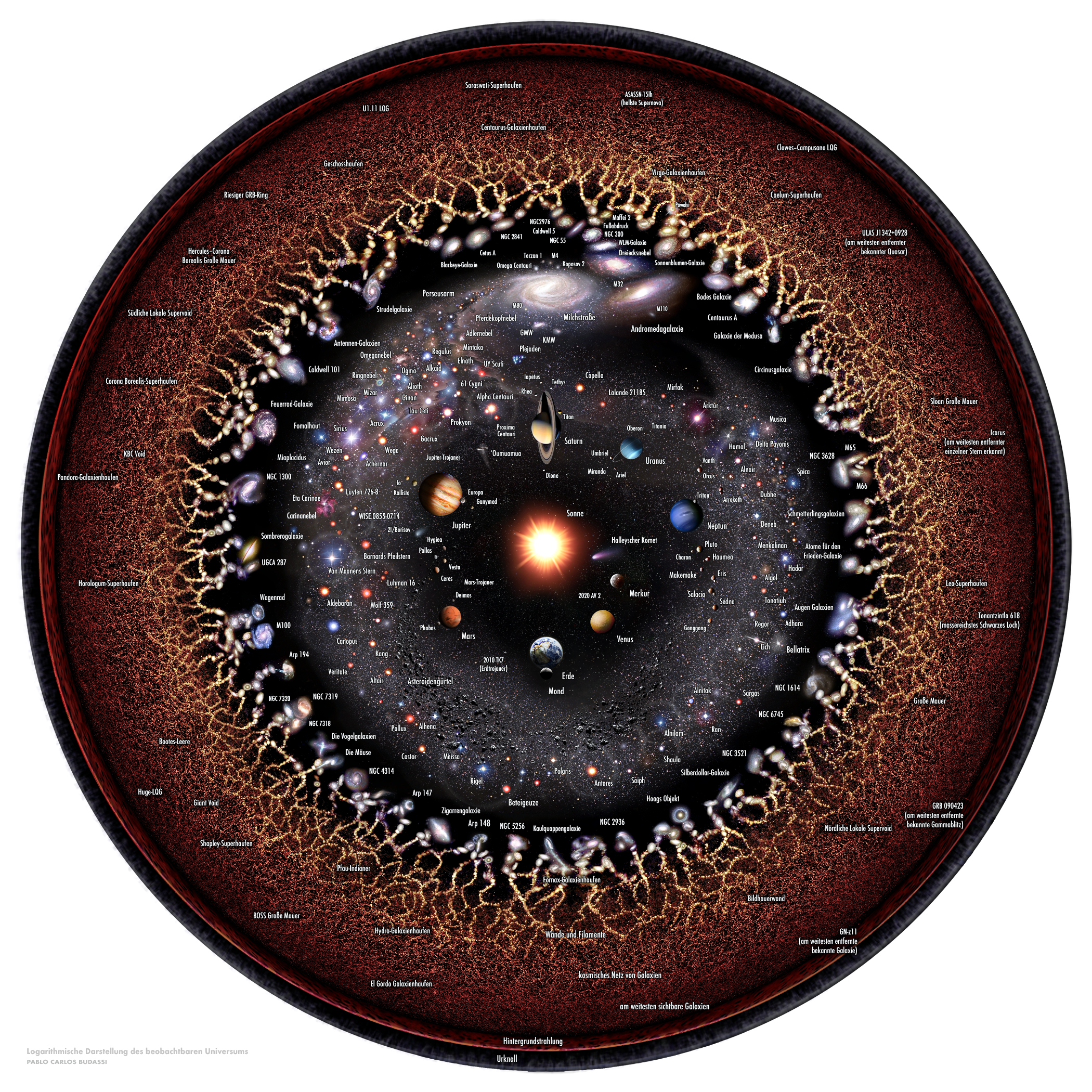 Logarithmische Konzeption des beobachtbaren Universums mit dem Sonnensystem im Zentrum, inneren und äußeren Planeten, Kuipergürtelobjekten, Alpha Centauri, Perseus Arm, Milchstraßengalaxie, Andromeda-Galaxie, nahe gelegenen Galaxien, kosmischem Netz, kosmischer Mikrowellenstrahlung und unsichtbarem Urknall Plasma am Rand. Die Entfernung von der Erde nimmt vom Zentrum bis zum Rand exponentiell zu. Himmelskörper sind vergrößert dargestellt, um ihre Formen zu erkennen.